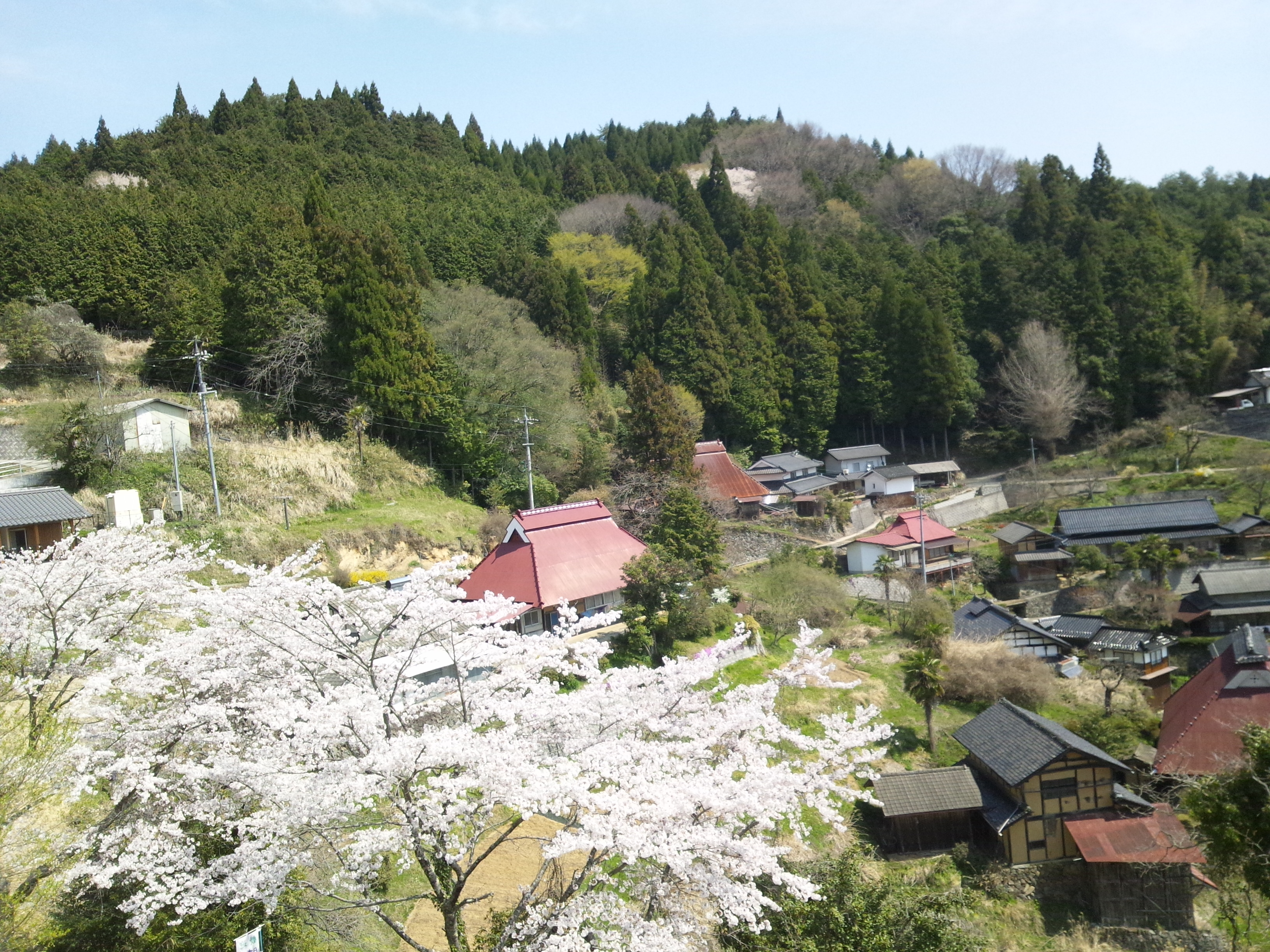 吉念寺集落